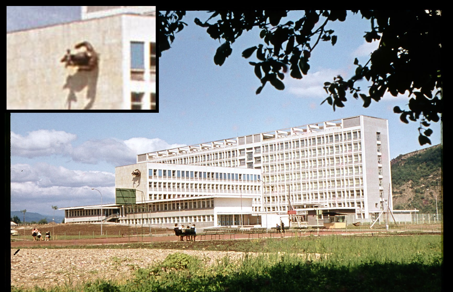 Vedere generală asupra zonei spitalului orășenesc Gheorghe Gheorghiu-Dej (actual „Sfântul Ierarh Dr. Luca al Crimeii”, Onești. Prima jumătate a anilor 1960.